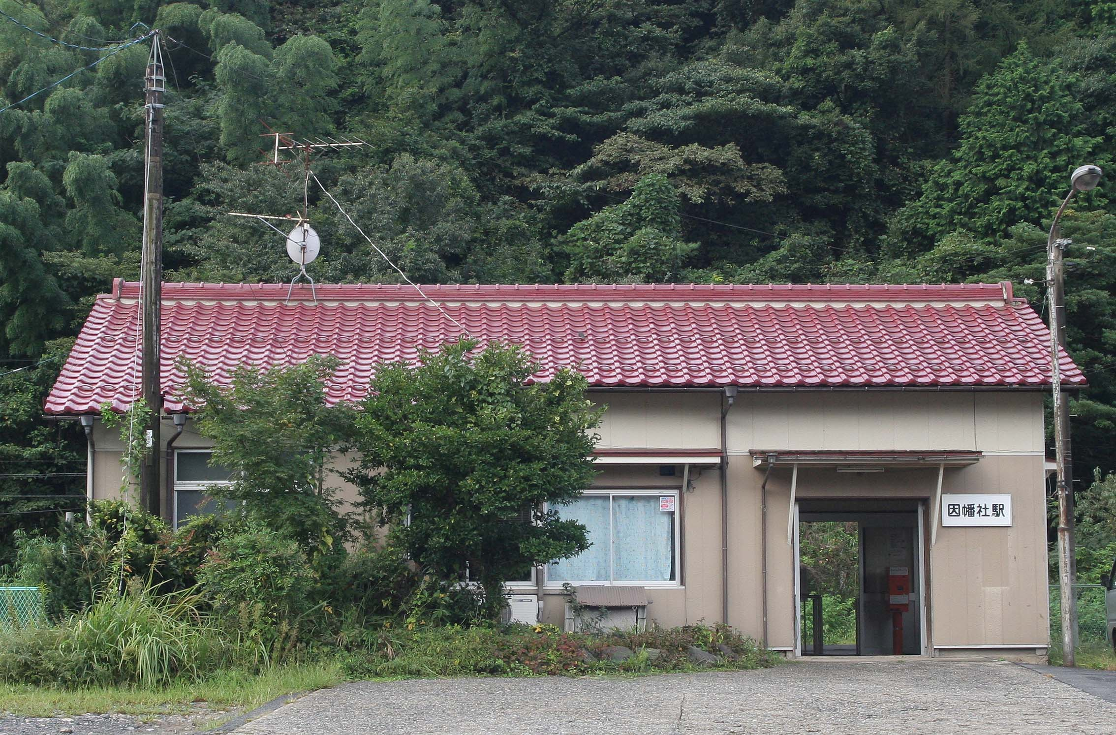 西日本旅客鉄道 因幡社駅の駅舎